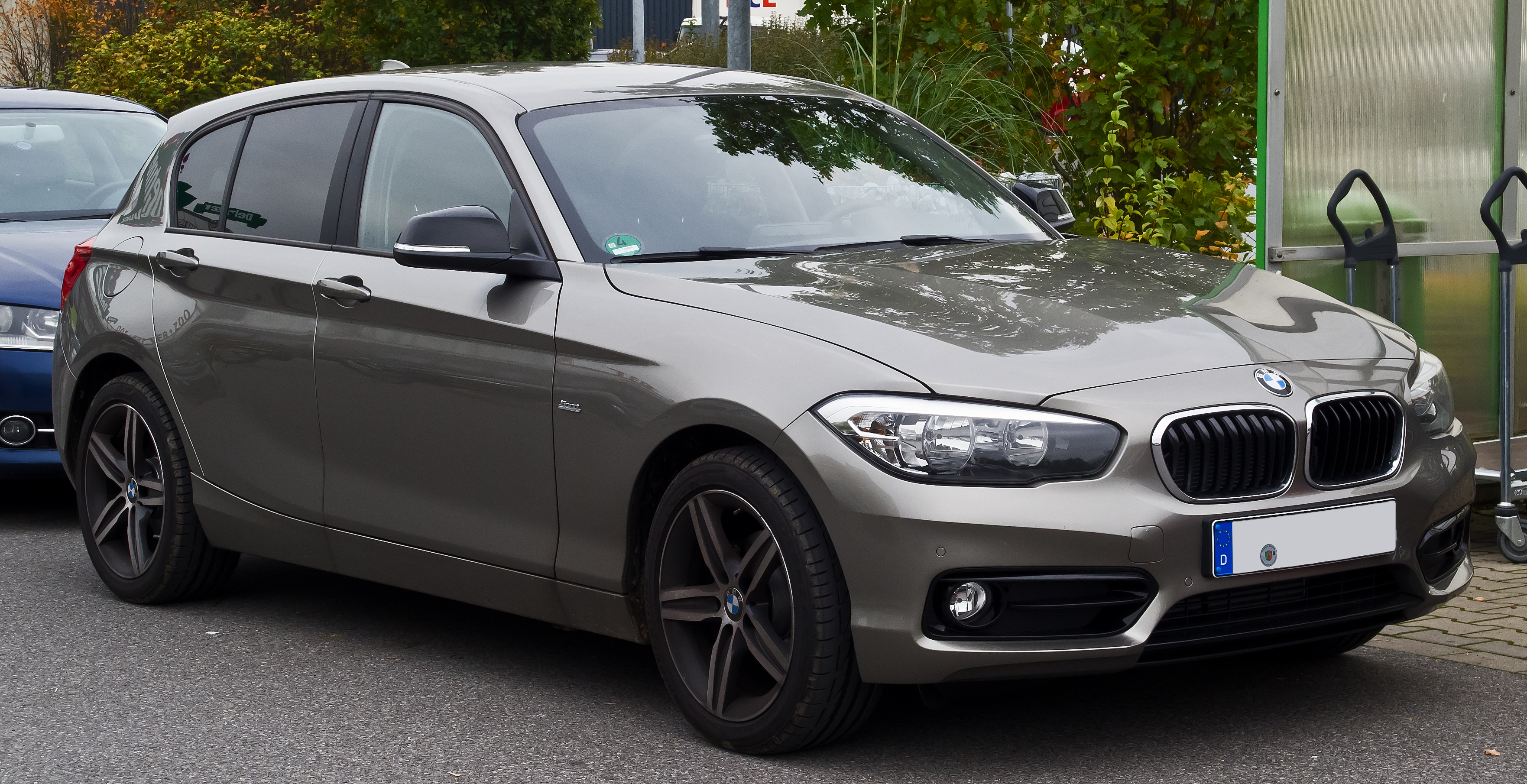 BMW 118i Sport Line (F20, Facelift)